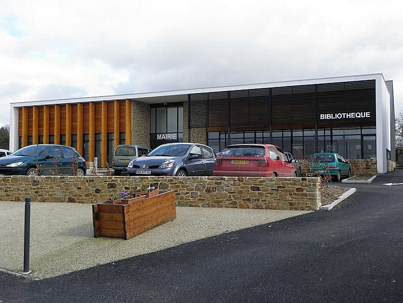 Mairie de Mézières-sur-Couesnon (35).